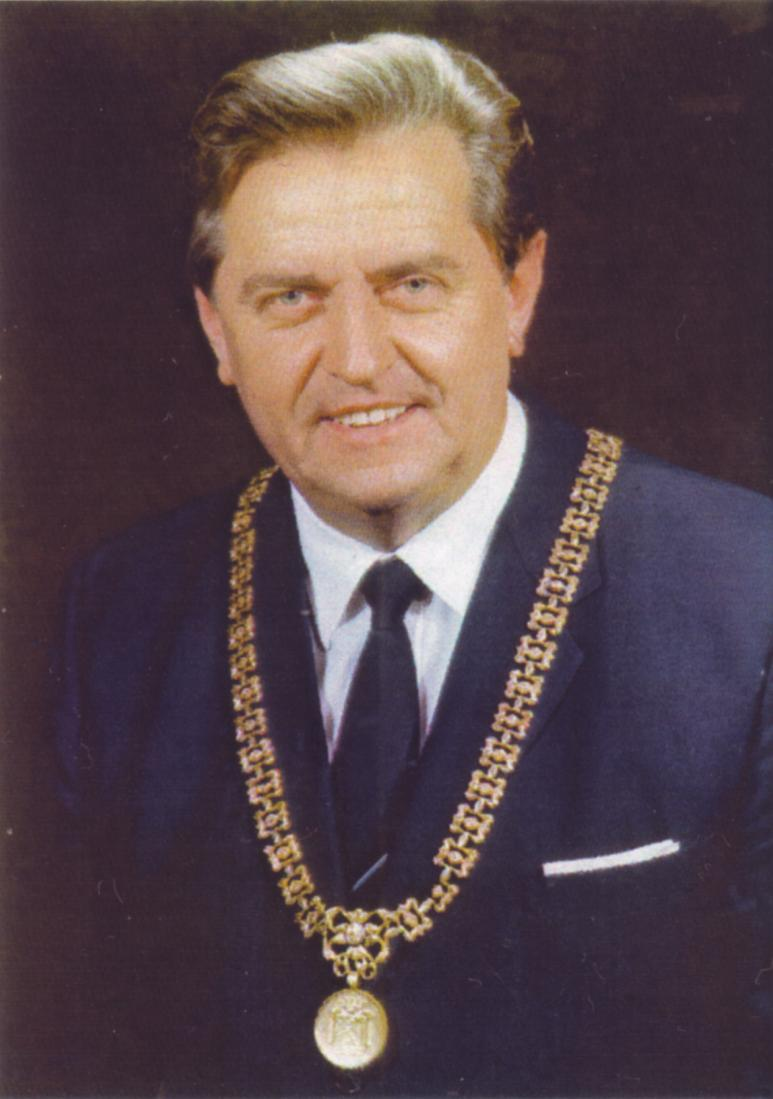 Hans Hösl, Oberbürgermeister der Stadt Passau 1984 bis 1990, zum Amtsantritt 1984 mit Amtskette